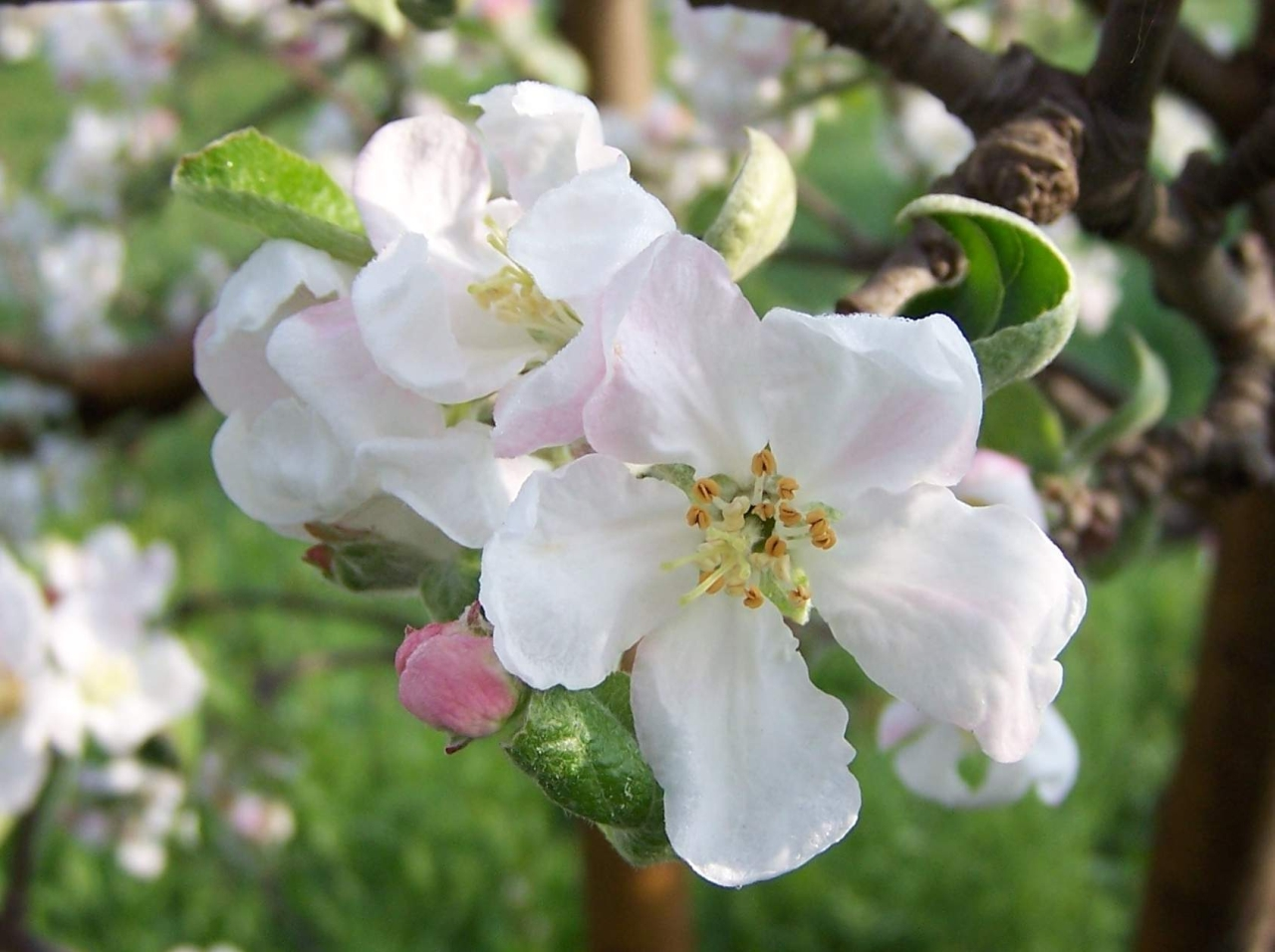 Malus domestica (pl. jabłoń domowa)